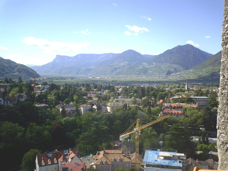 Merano, Alto Adige, Italia Description in de wikipedia Meran; Blick über die Stadt nach Süden foto by me PD